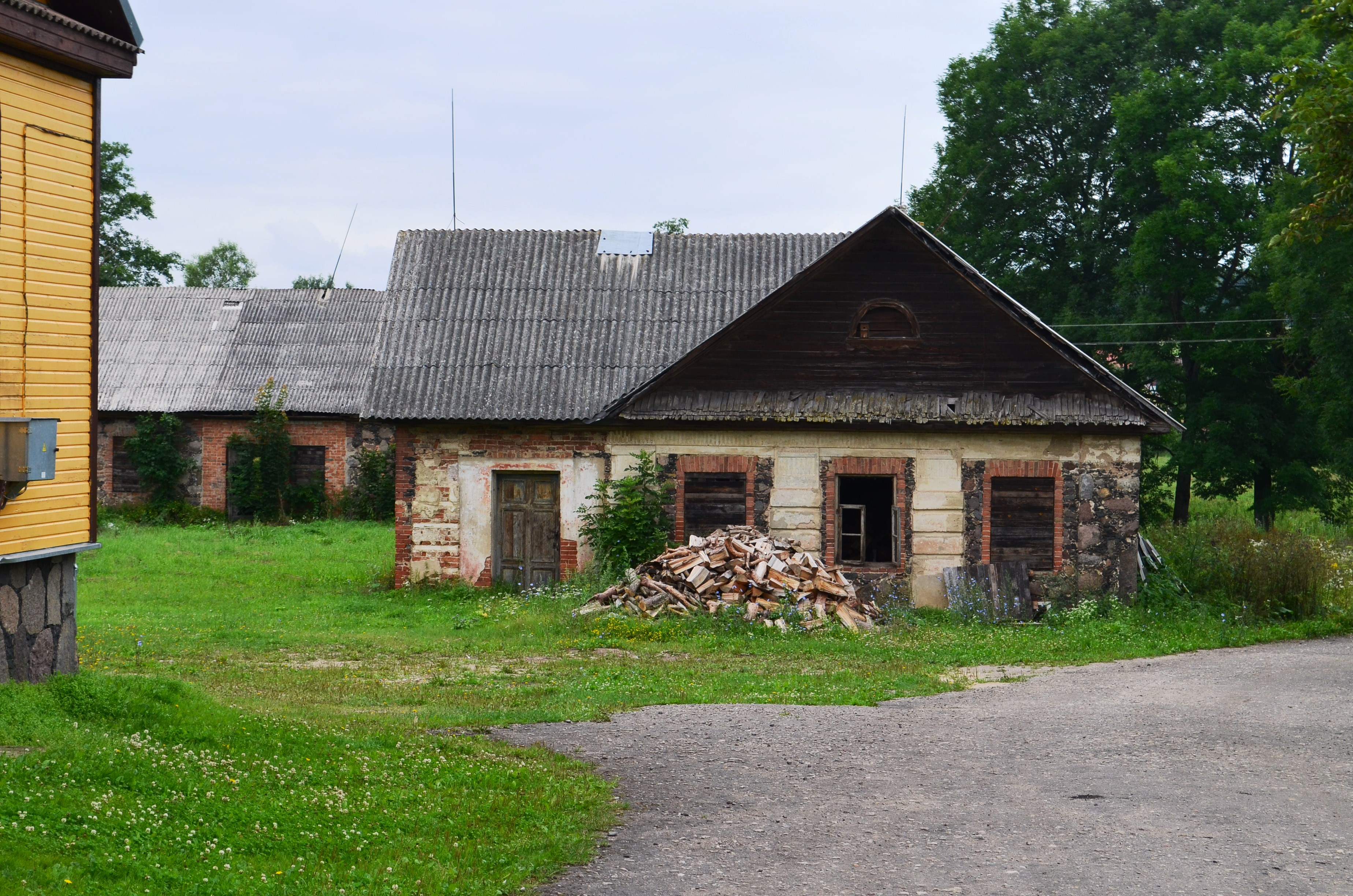 Vienas iš Užpalių dvaro statinių, Utenos r.